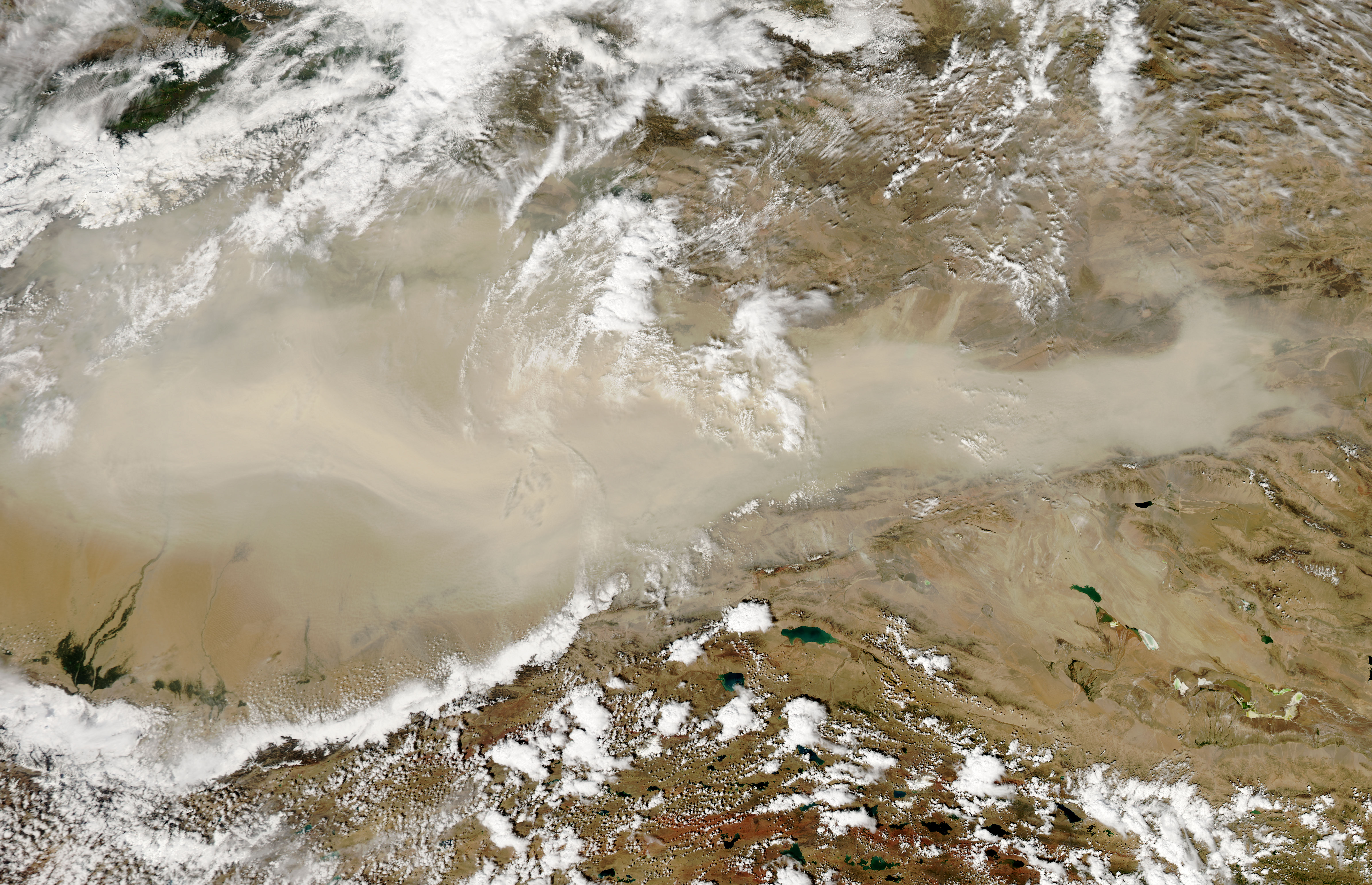 Dust storm in Taklimakan Desert, Western China